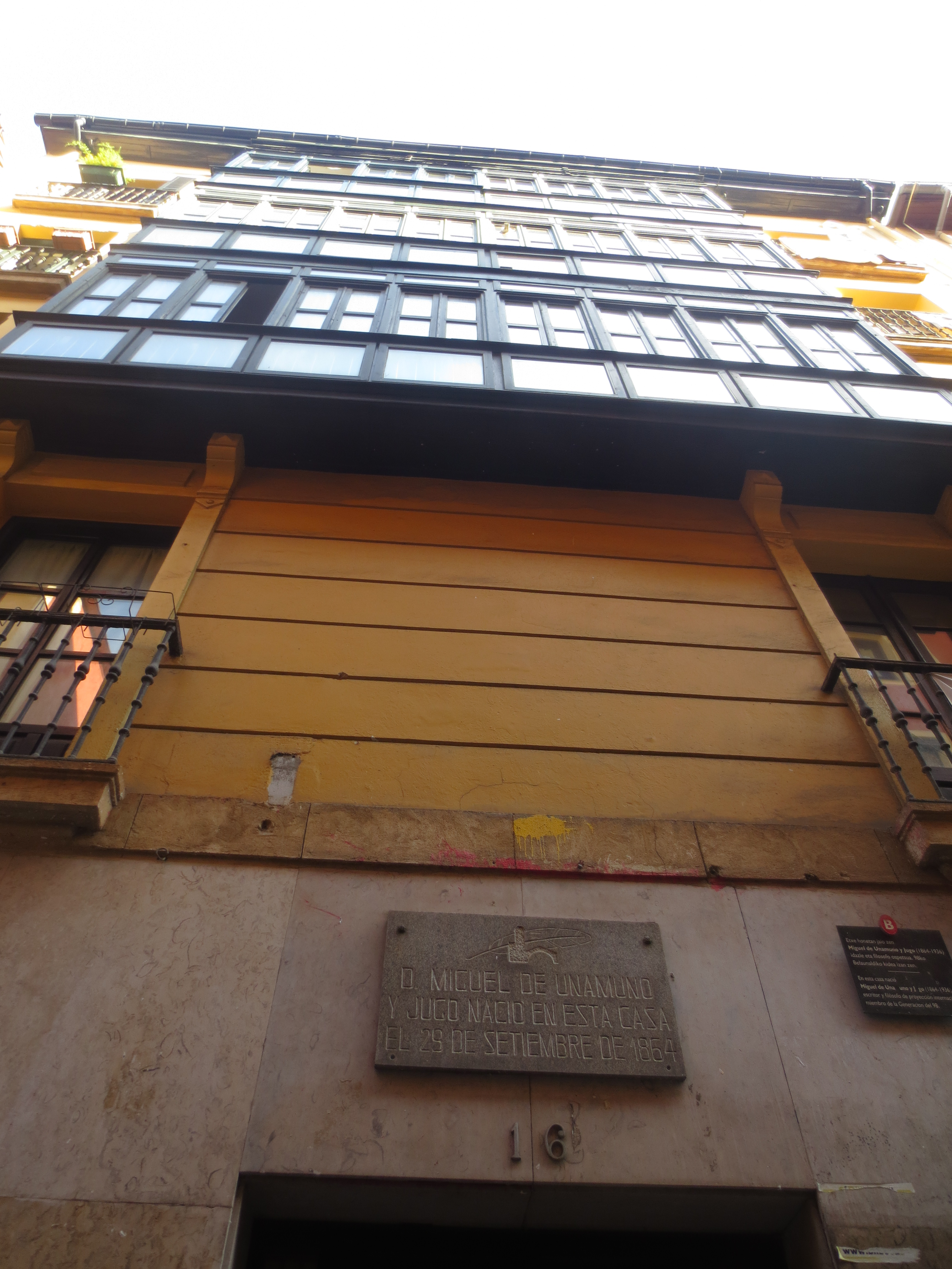 Errondabide, 16